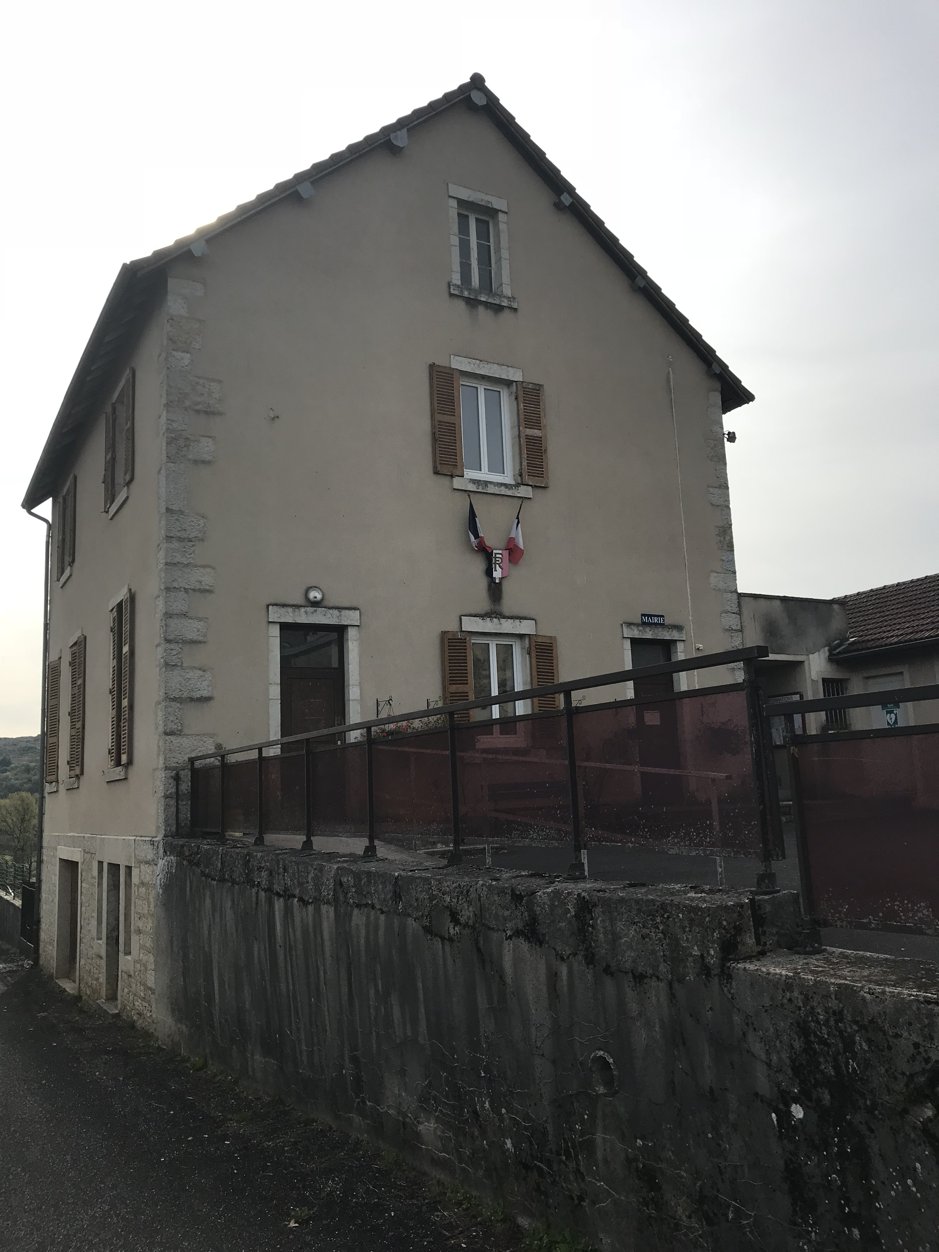 Vue du village de Véria (Jura, France) en octobre 2017.